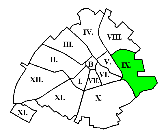 Kecskemét IX. kerületének elhelyezkedése